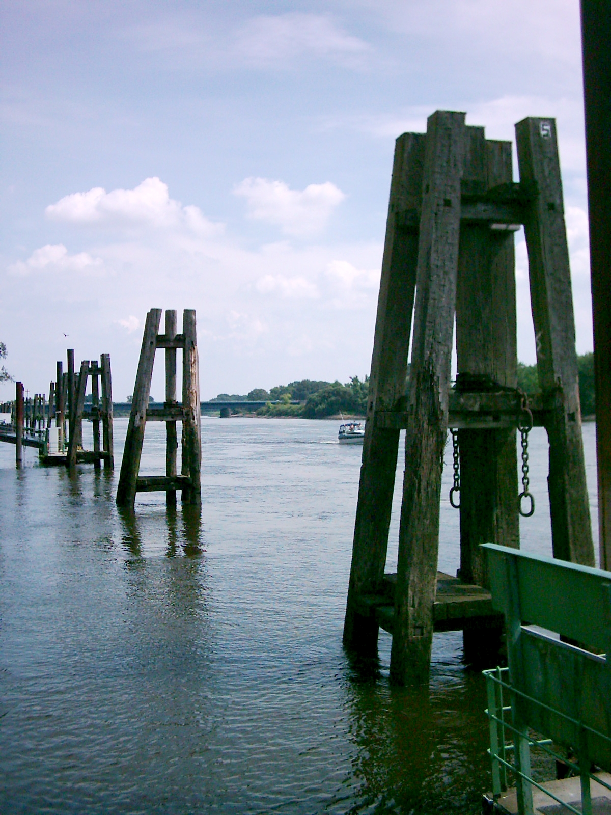 Dalben aus Holz